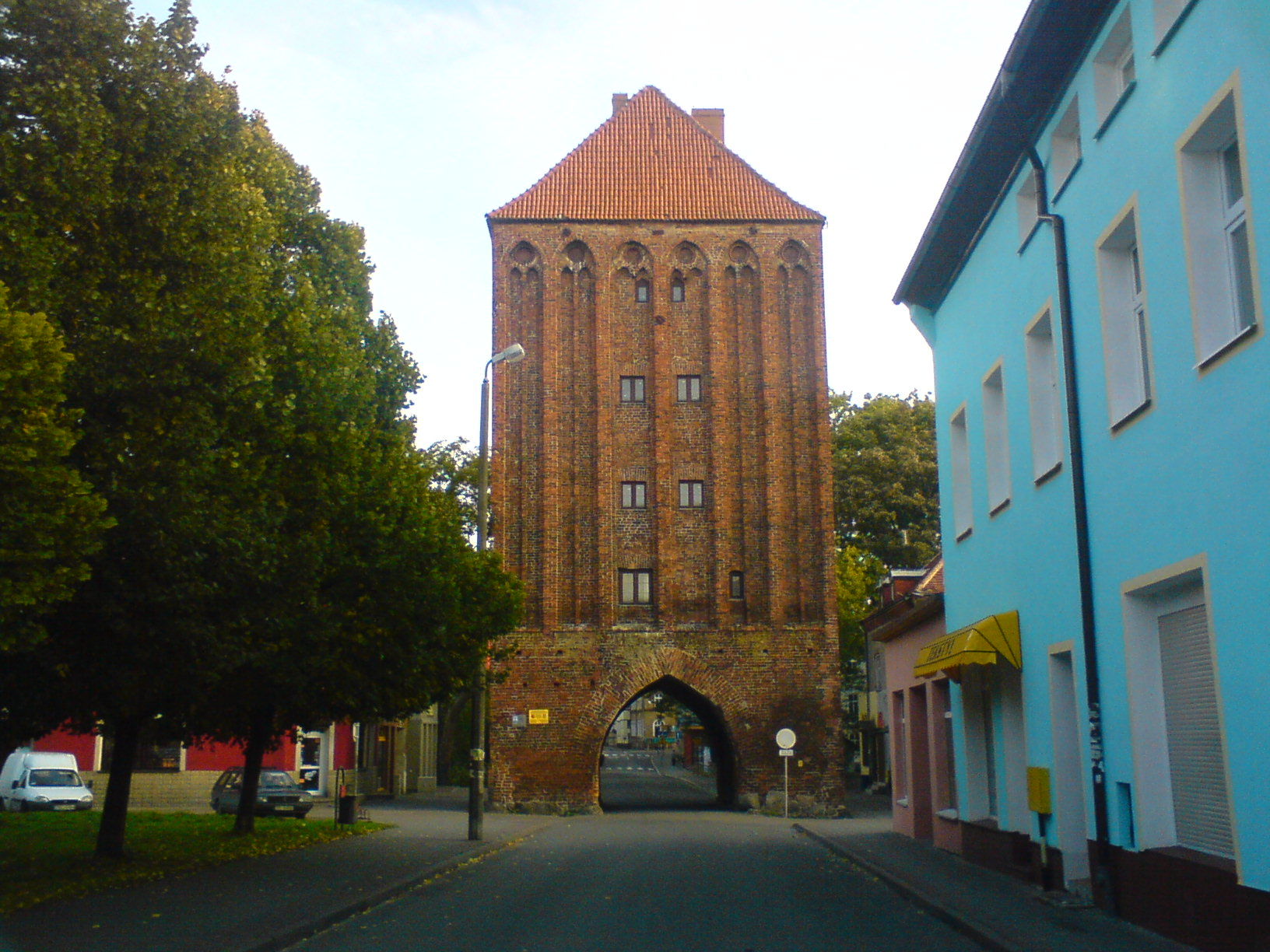 Słupsk's Bastille